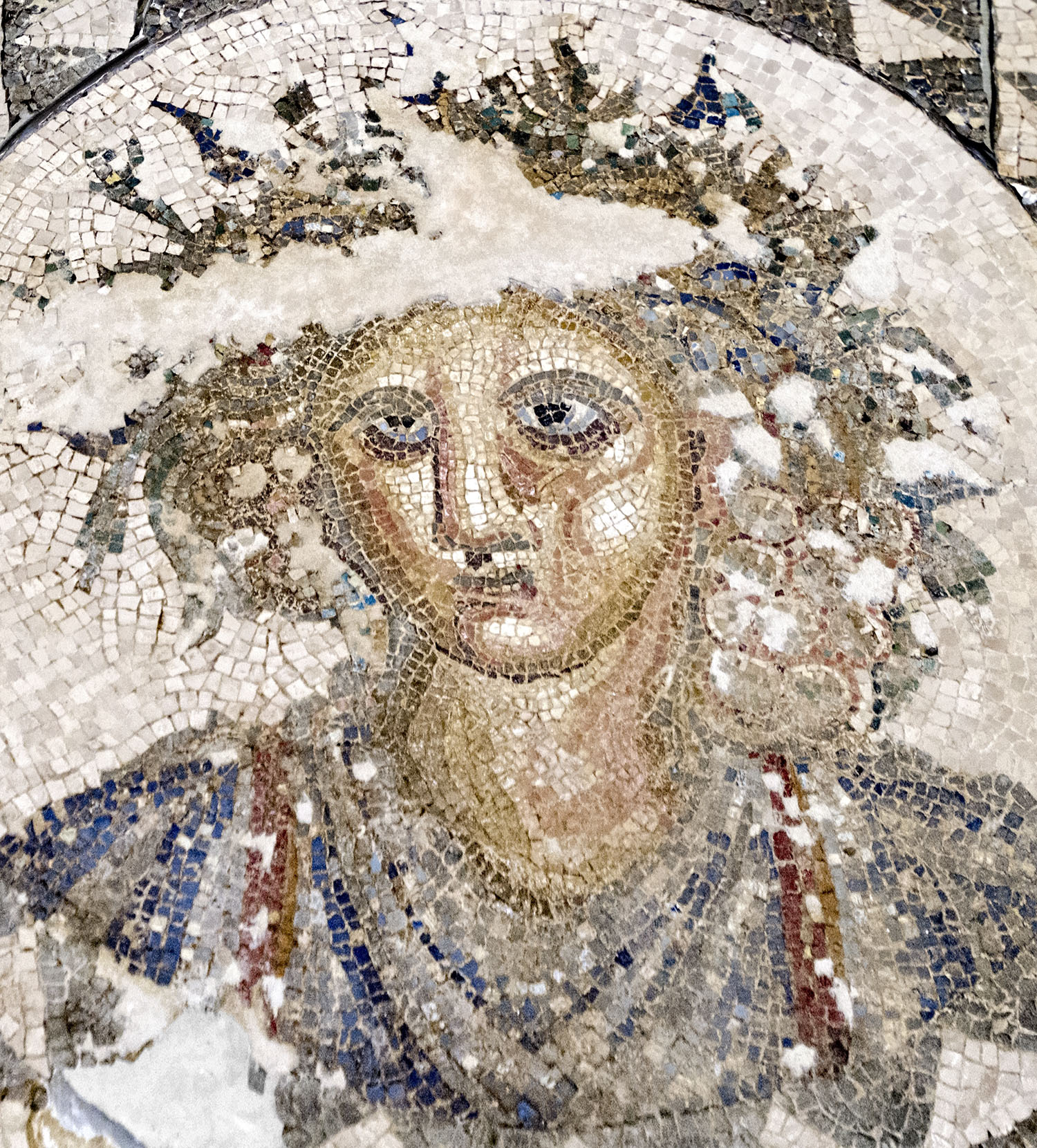 Uno de los medallones del mosaico romano de Baco, localizado en otoño de 2004 en un tramo de obras de la N-IV entre Puerto Real y Tres Caminos. Está datado en el siglo IV.